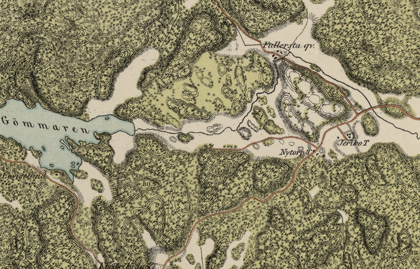 Gömmaren med Fullersta kvarn, Nytorp och Jeriko.